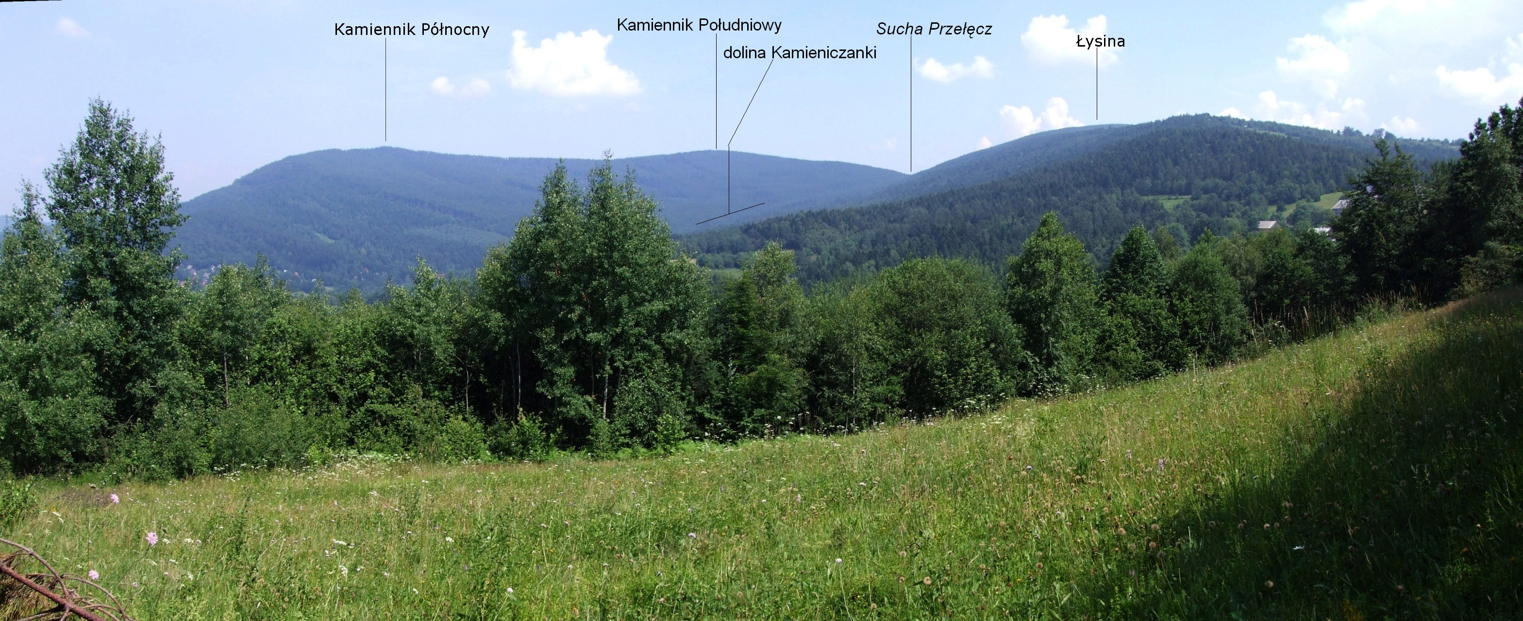 Widok z Poręby na Pasmo Lubomira i Łysiny